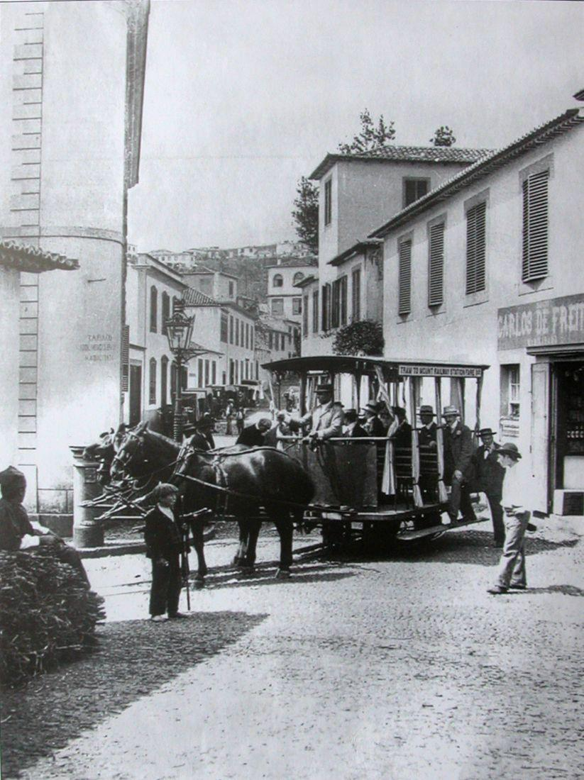 Carro Americano descendo a Rua das Dificuldades. Caminho de Ferro do Monte. Fotografia de Joaquim Augusto de Sousa. Antiga colecção Dr. Brito Gomes (Canavial), Funchal, ilha da Madeira. Pub.in "Madeira Once upon a time", texto de Cecil Miles com tradução de Mark Garton, in Islenha n.º 15, direcção de Nelson Veríssimo, Funchal, DRAC, Jul. - Dez. 1994, p. 1995, p. 89. Pub. por Luís Valentim Gomes, O Caminho do Comboio e as Alterações Urbanísticas do Funchal, Tese de Mestrado com introdução do orientador, Rui Carita, CEHA, Funchal, 2005. Pub. in A Tribuna da Madeira, Funchal, Novembro de 2005.